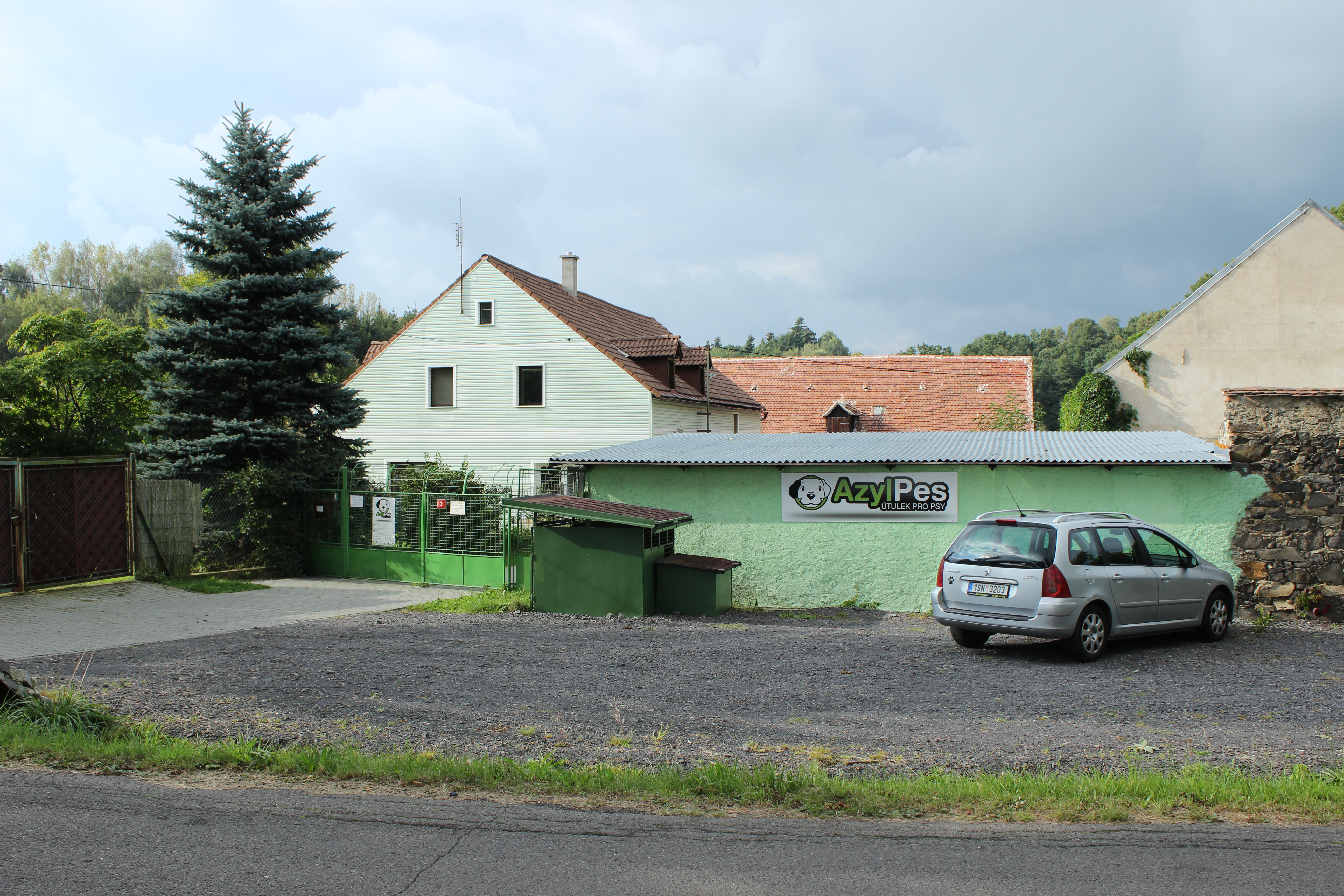 Objekt zvířecího útulku Azyl Pes v Krásném Lese v libereckém okrese.